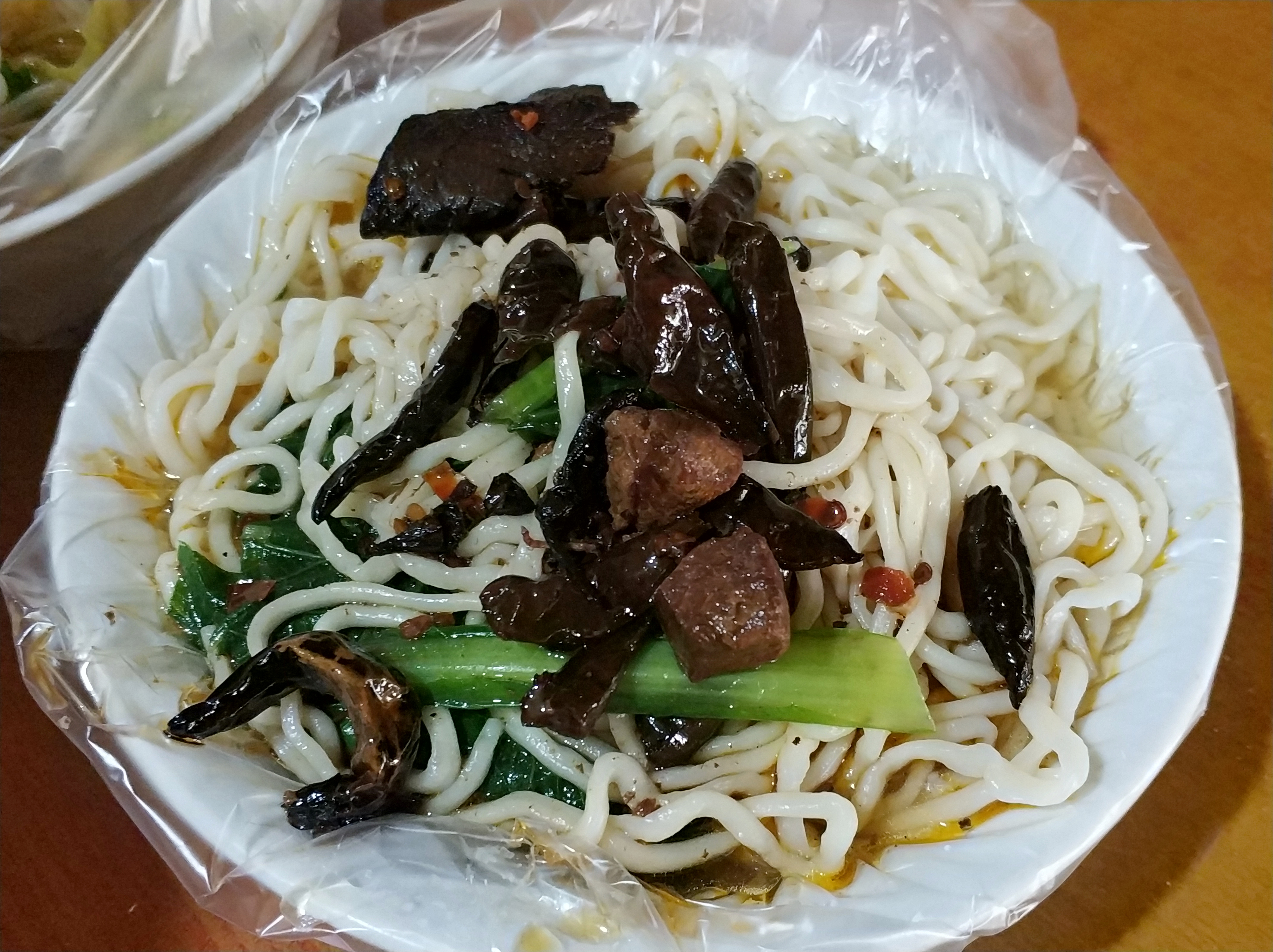 中文（中国大陆）: 河北省唐山市路北区